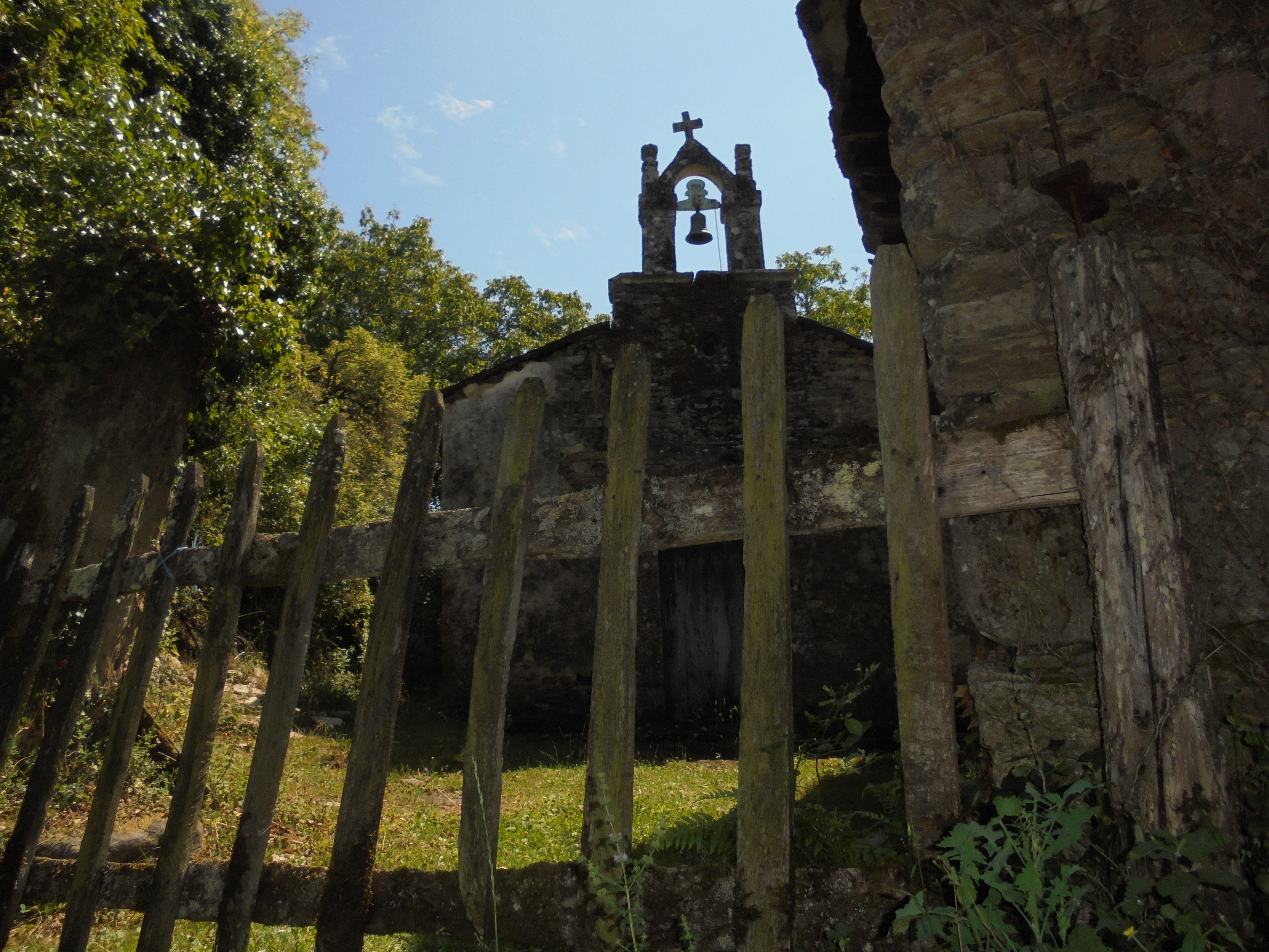 Igrexa de Santalla de Riba de Neira